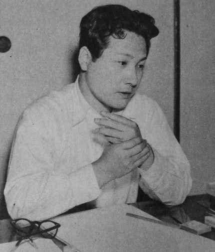 福井英一